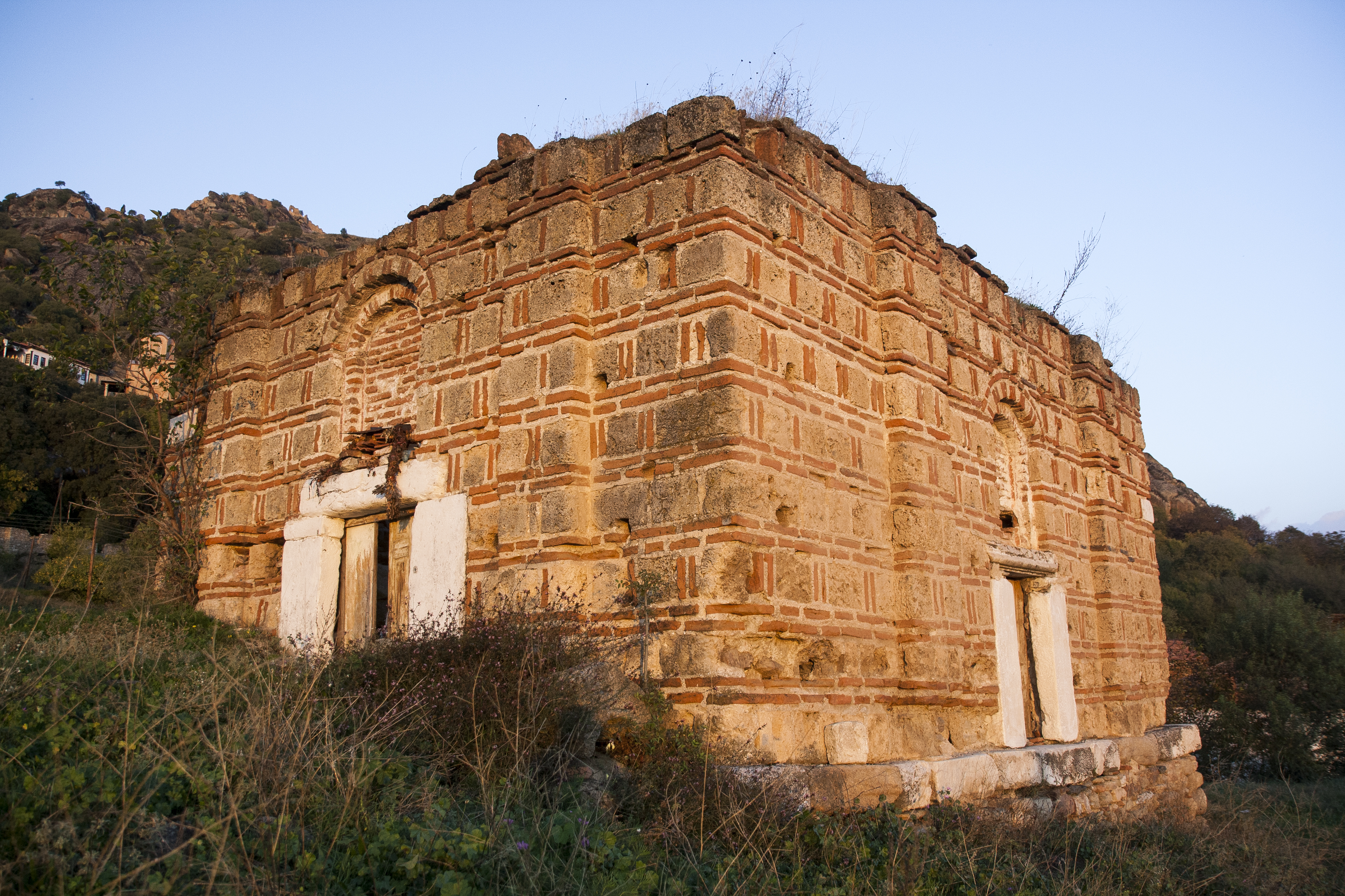 Црква Св. Атанас, Варош, Прилеп